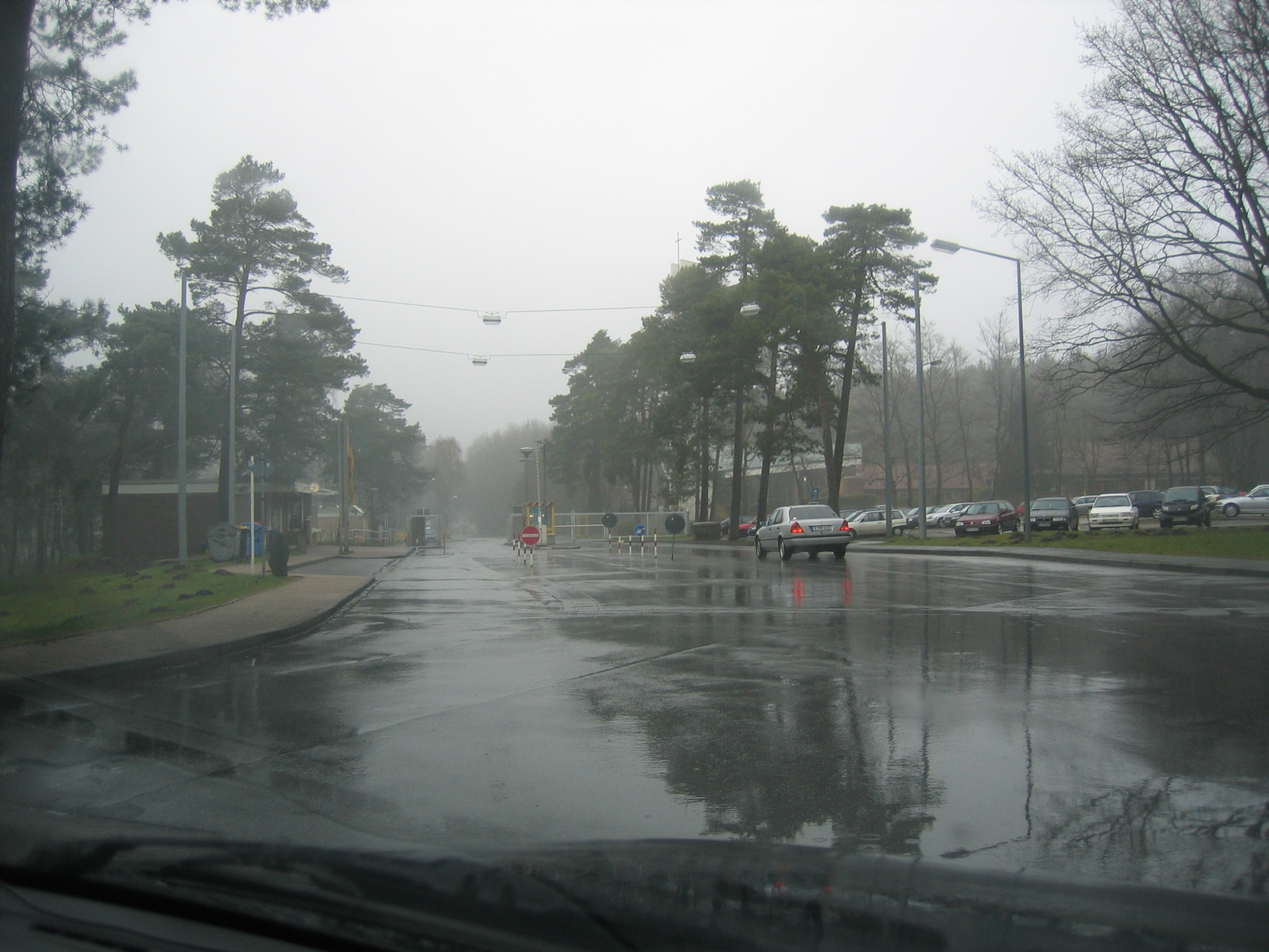 Nordtor Generalfeldmarschall-Rommel-Kaserne, Blick nach Norden.